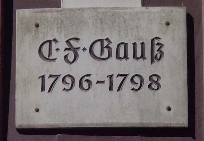 Göttinger Gedenktafel für Carl Friedrich Gauß, Mathematiker und Astronom (Kurze-Geismar-Straße 25)